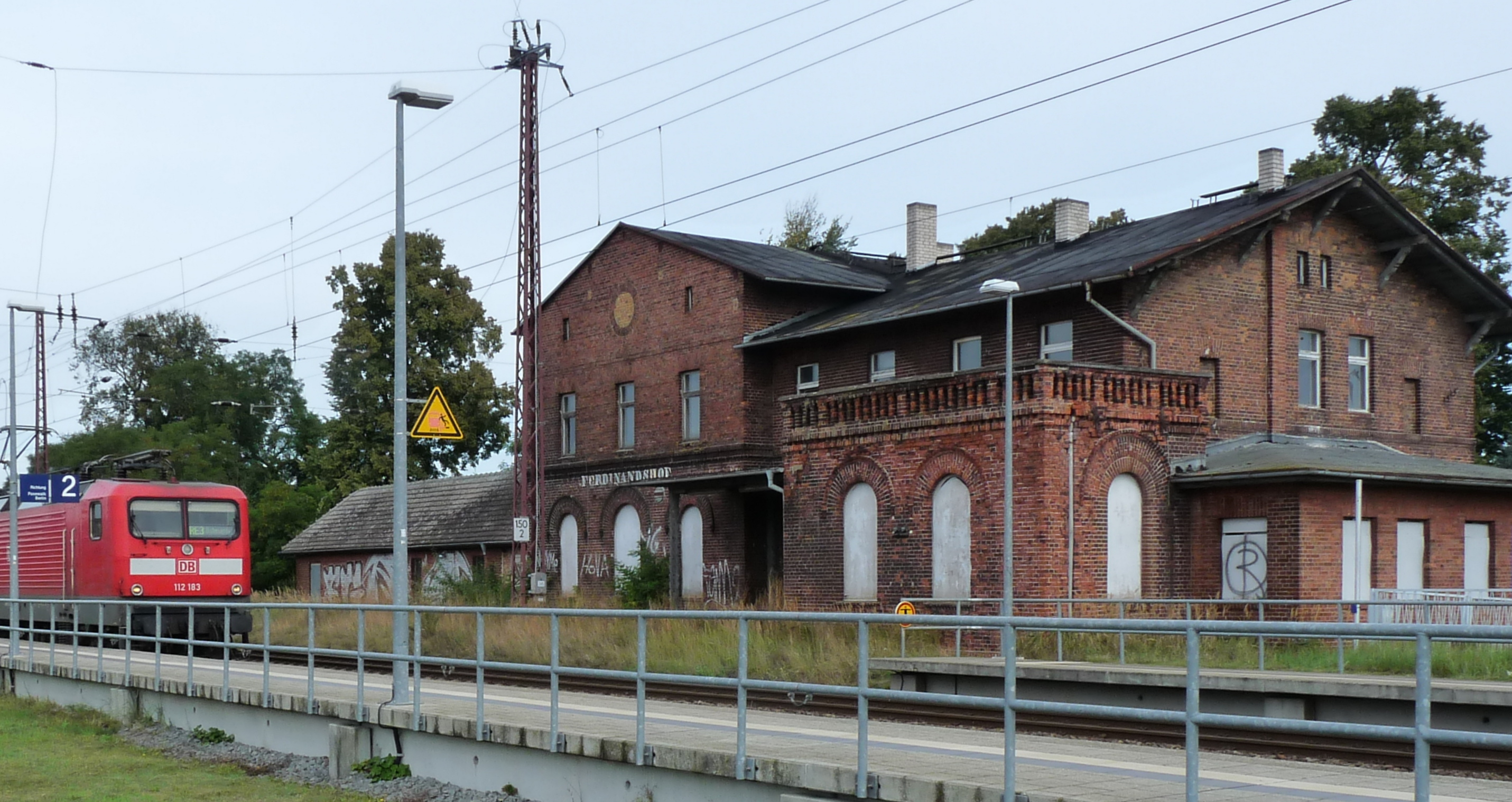 Bahnhof Ferdinandshof mit einfahrendem Zug bei schönem Wetter